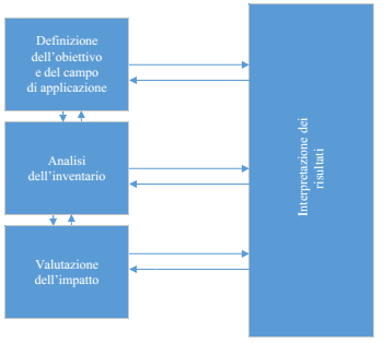 Le 4 fasi che compongono il Life Cycle Assessment